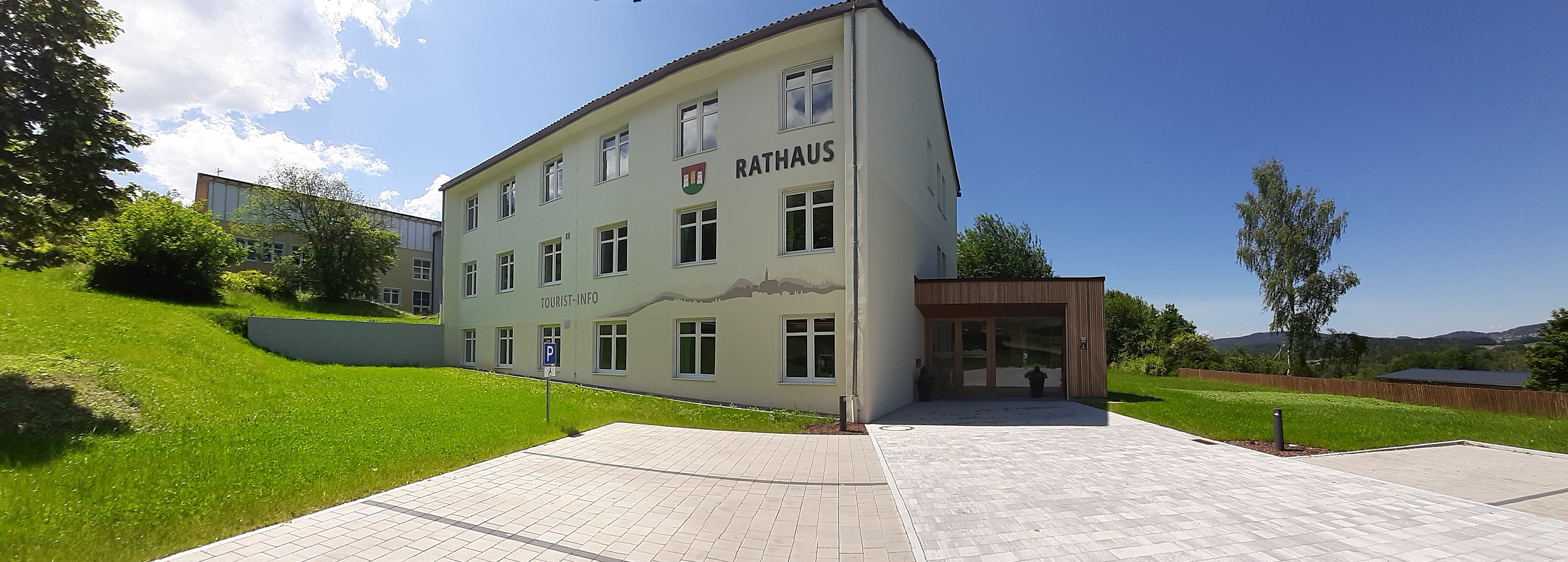 Rathaus und Tourist-Info in Hohenwarth